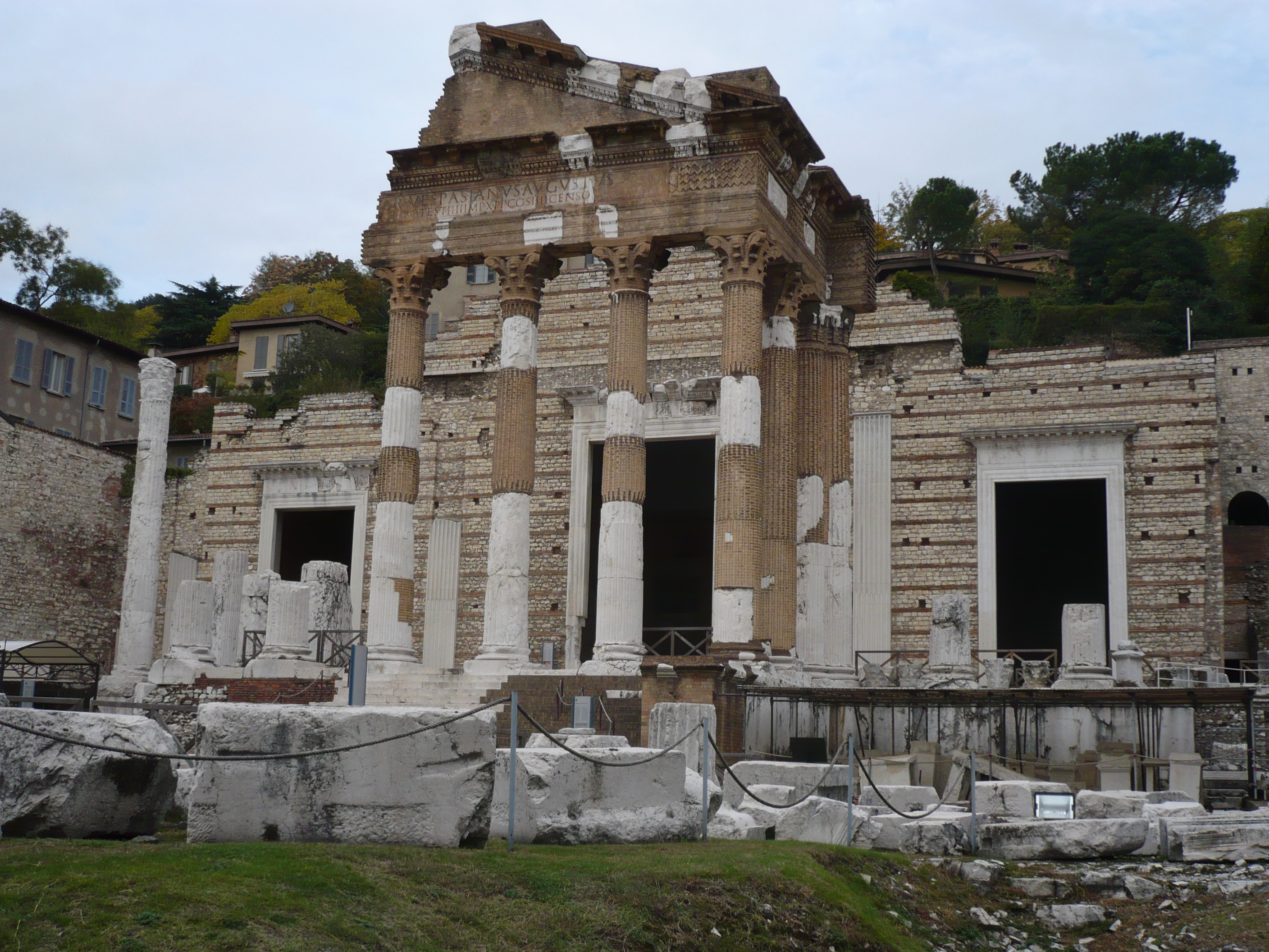 Ancient Roman temple (Capitolium) in Brescia